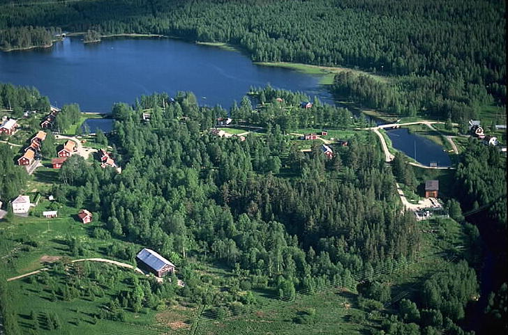 Motiv: Graningebruk Nyckelord: Flygbilder, Riksintressen Kategori: Bruksmiljö.